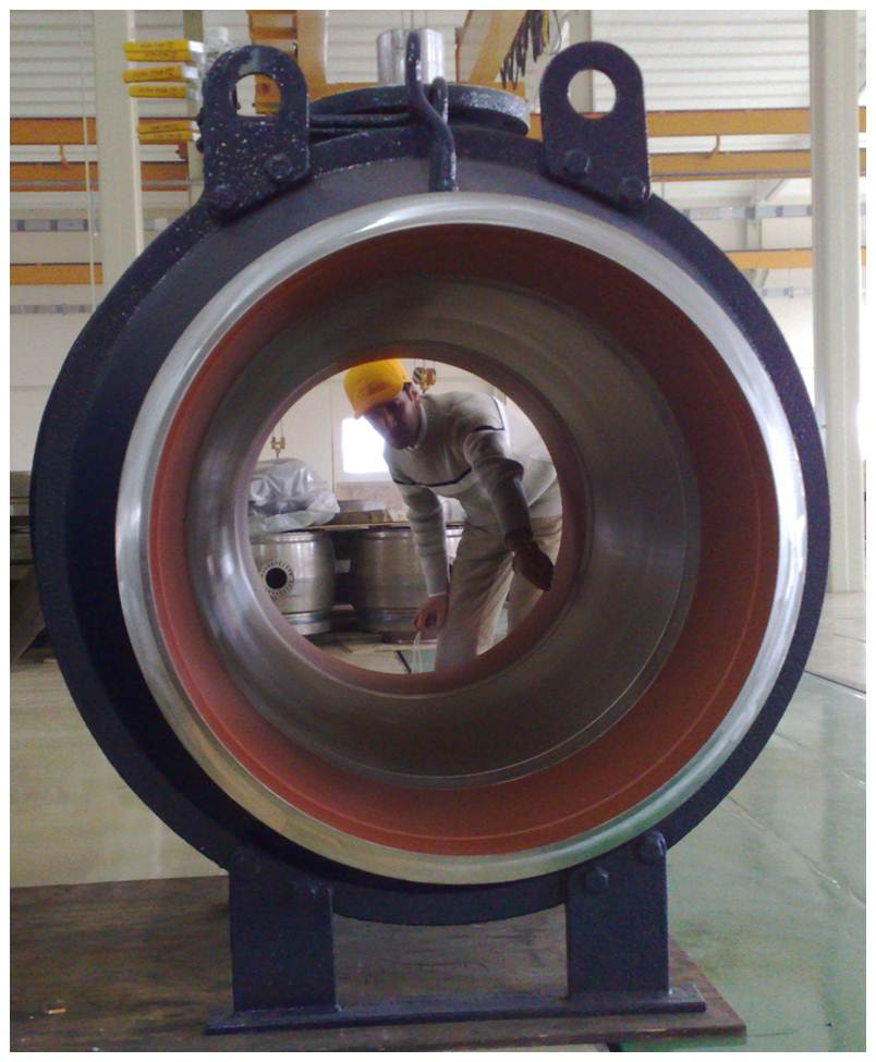 این تصویر با دوربین خودم اخذ شده و نفر حاضر در تصویر هم خودم هستم